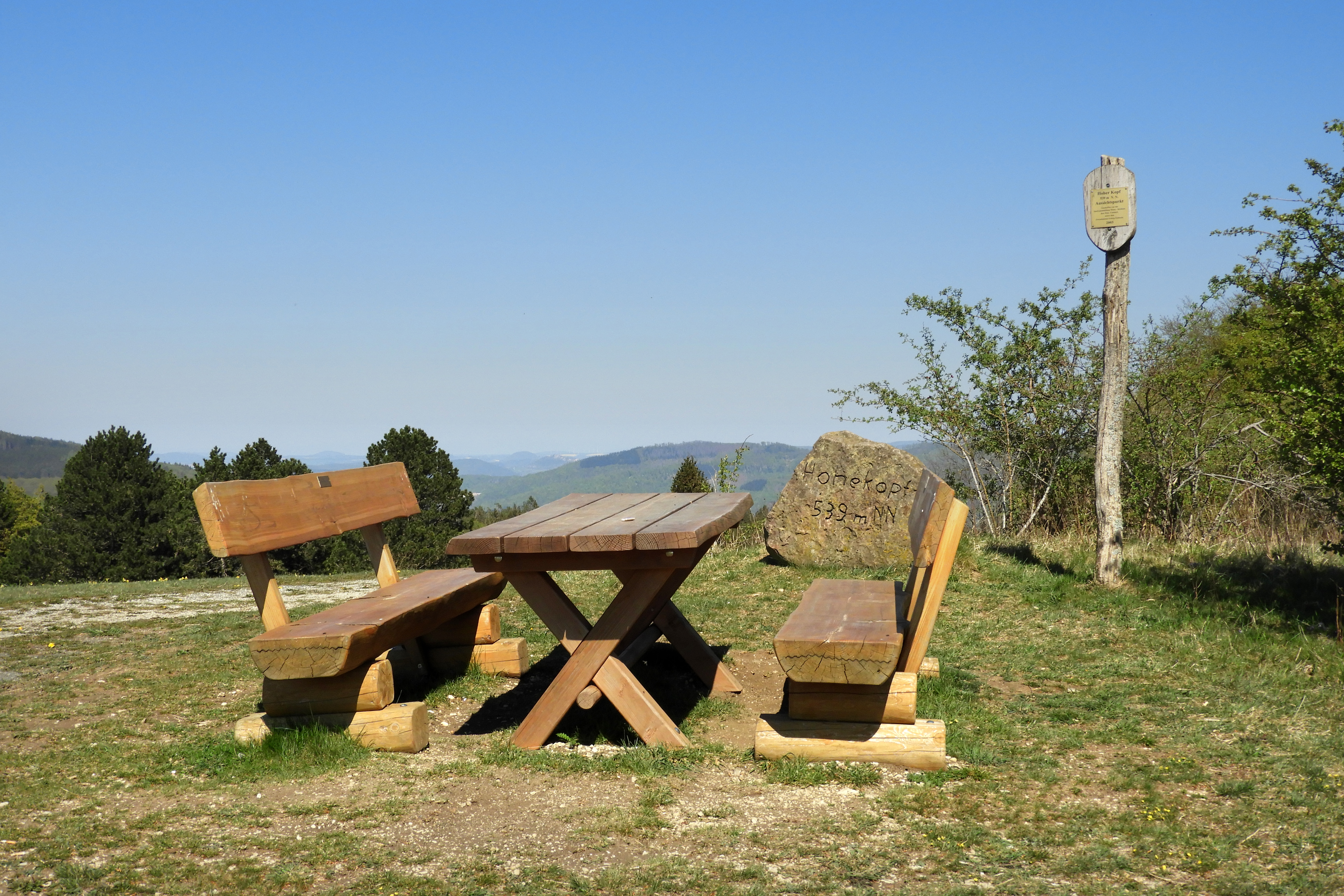 Der „Hohekopf bei Großalmerode“ erhebt sich mit einer Höhe von 539,4 m östlich von Epterode aus der Mittelgebirgslandschaft der Söhre im nordhessischen Werra-Meißner-Kreis. Auf dem Bergrücken und einer östlich angrenzenden Senke haben sich Halbtrockenrasen und Sumpfwiesen entwickelt, die zum Lebensraum seltener Pflanzen und Tiere geworden sind. Um den Standort stark gefährdeter Arten zu erhalten und fortzuentwickeln wurden knapp vierzehn Hektar, auf dem umgangssprachlich auch Epteröder Kopf genannten Gipfel, im Jahr 1986 als Naturschutzgebiet ausgewiesen. Mit rund 49 Hektar, durch eine Erweiterung mit südlich angrenzenden Flächen, ist dieser Bereich später auch als gleichnamiges Flora-Fauna-Habitat-Gebiet zu einem Teil des europaweiten Schutzgebietssystems „Natura 2000“ geworden, das eine länderübergreifende Vernetzung von bedrohten Lebensräumen zum Ziel hat.